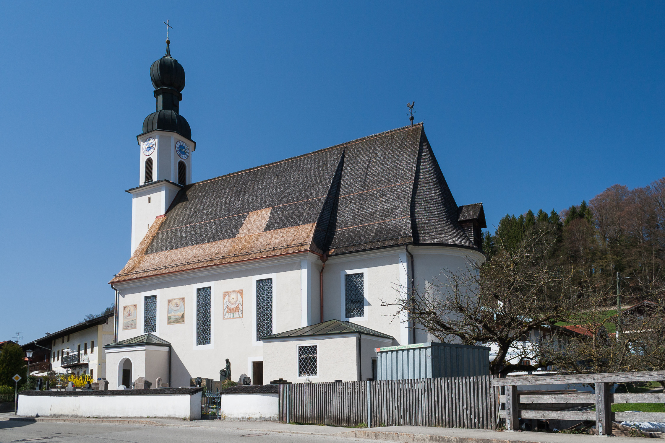 Filial- und Wallfahrtskirche Mariä Himmelfahrt, Antwort, Bad Endorf, Landkreis Rosenheim, Bavaria, Germany